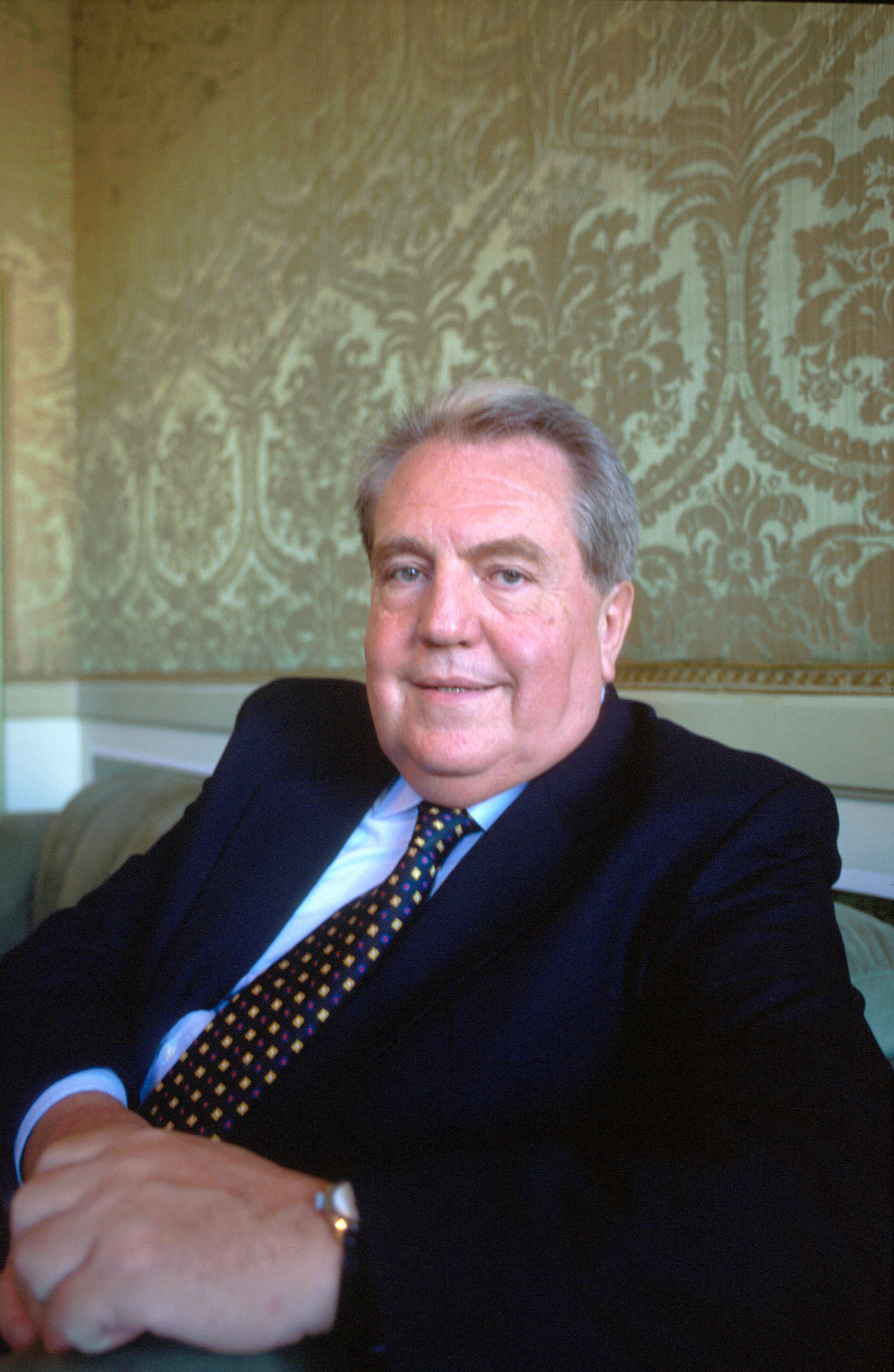 Lo scrittore Giuseppe Pontiggia finalista del premio Campiello del 1994